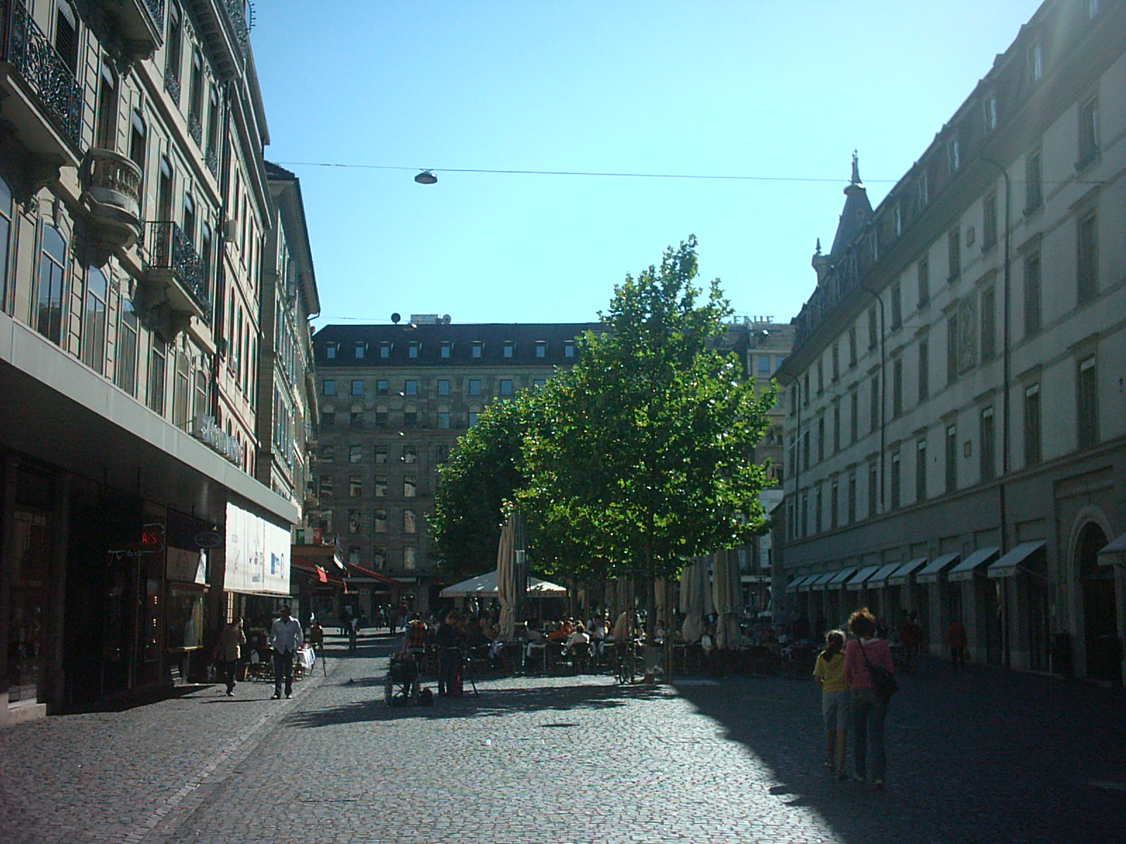 Place du Molard à Genève (Suisse)